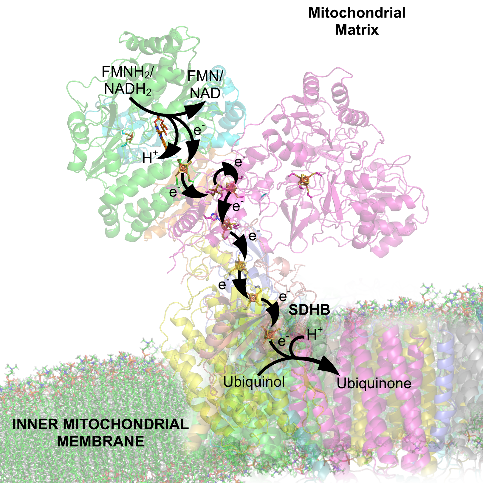 NADH Dehydrogenase 2FUG Electron Carriers Labeled